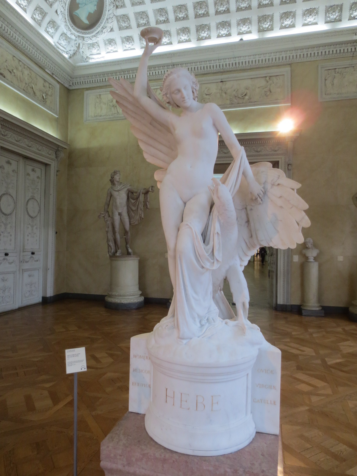 " Hébé et l'aigle de Jupiter ", 1852-1857, par les sculpteurs François Rude et Paul Cabet, Musée des beaux-arts de Dijon